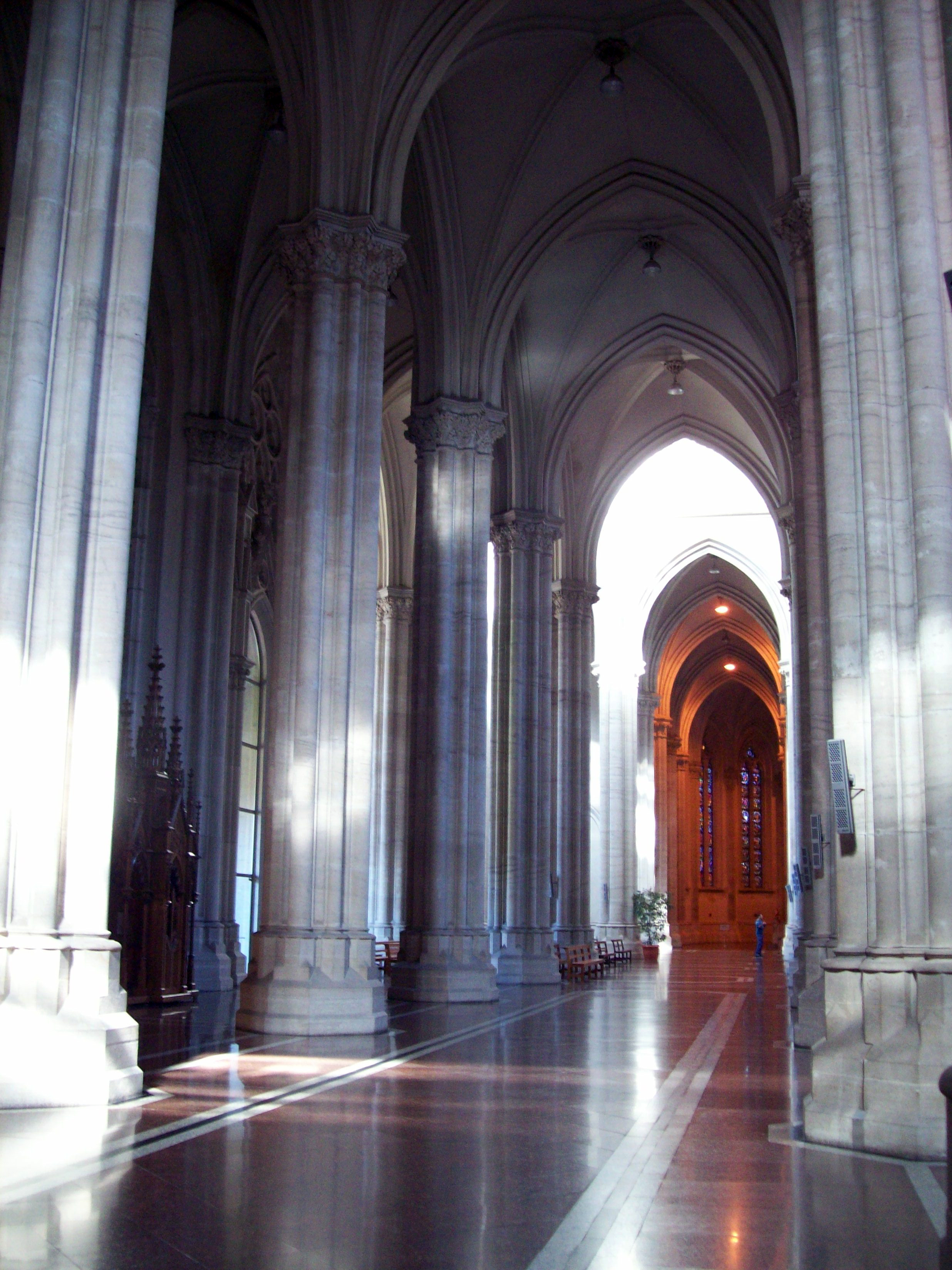 Interior de la Catedral de La Plata. Pilares de piedra del interior del templo platense.